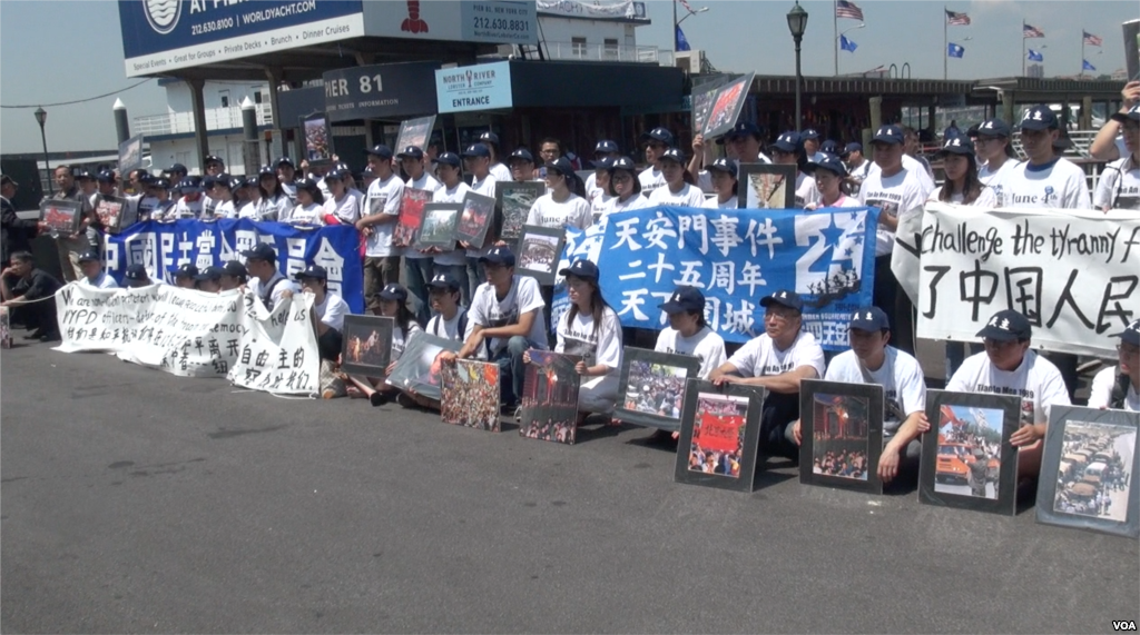 中文（中国大陆）: “天下围城”在总领馆前的抗议活动